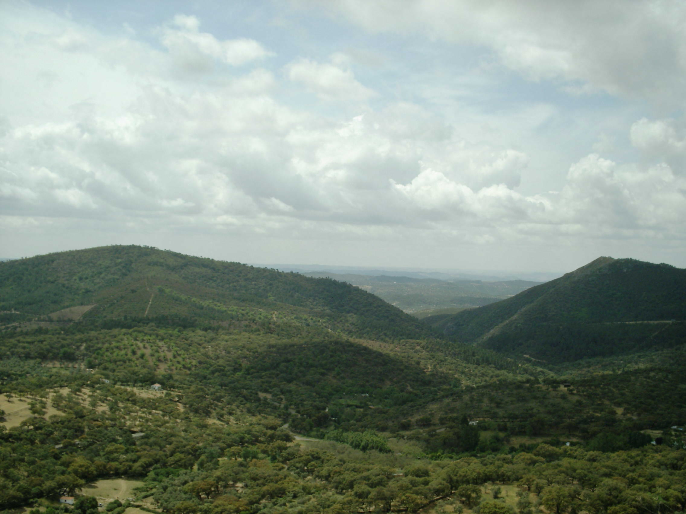 Foto de la Sierra de Aracena (Huelva - España) Photo du massif de la Sierra de Aracena (Huelva - Espagne) Picture of Sierra de Aracena (Huelva - Spain)